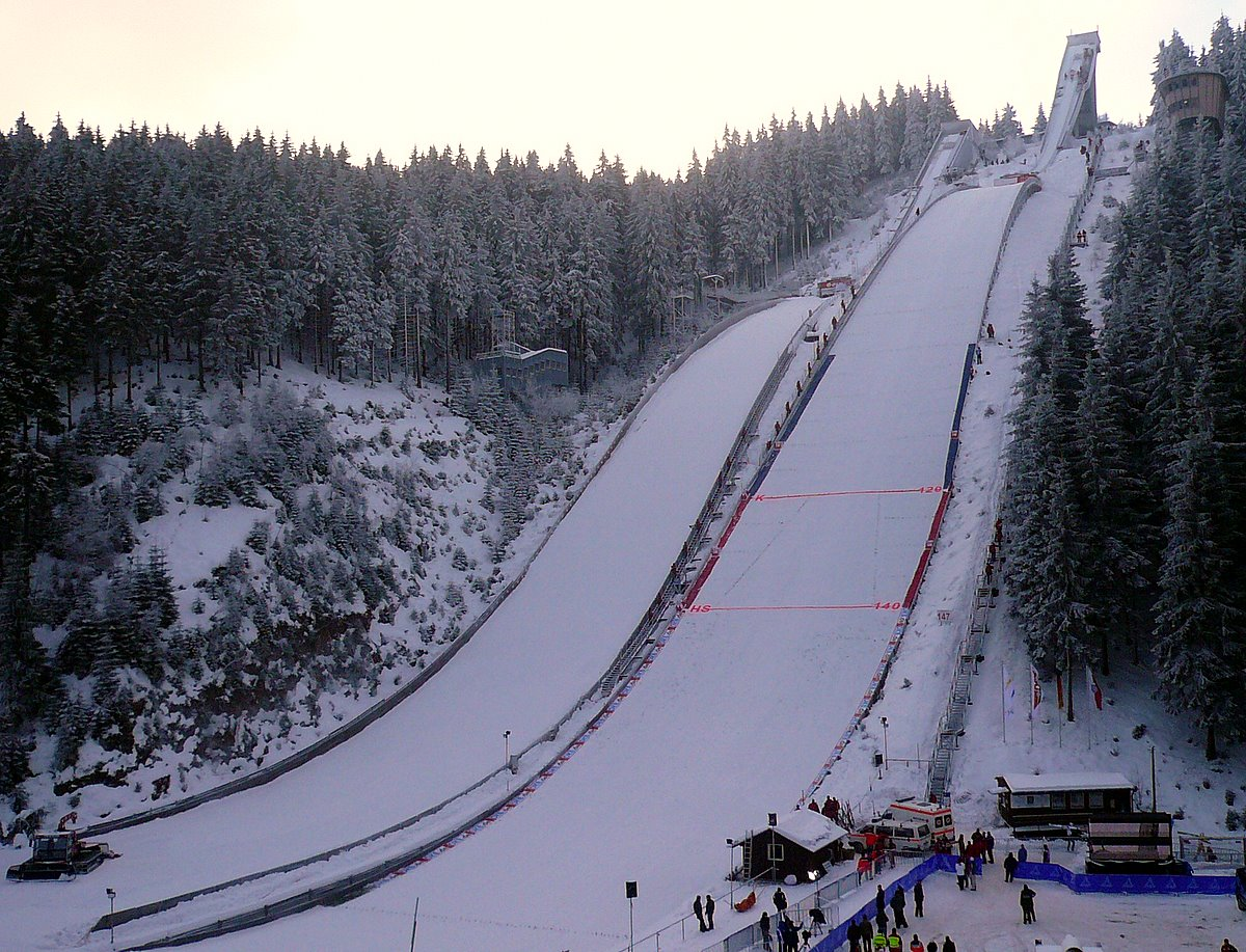 Schanzenanlage im Kanzlersgrund bei Oberhof